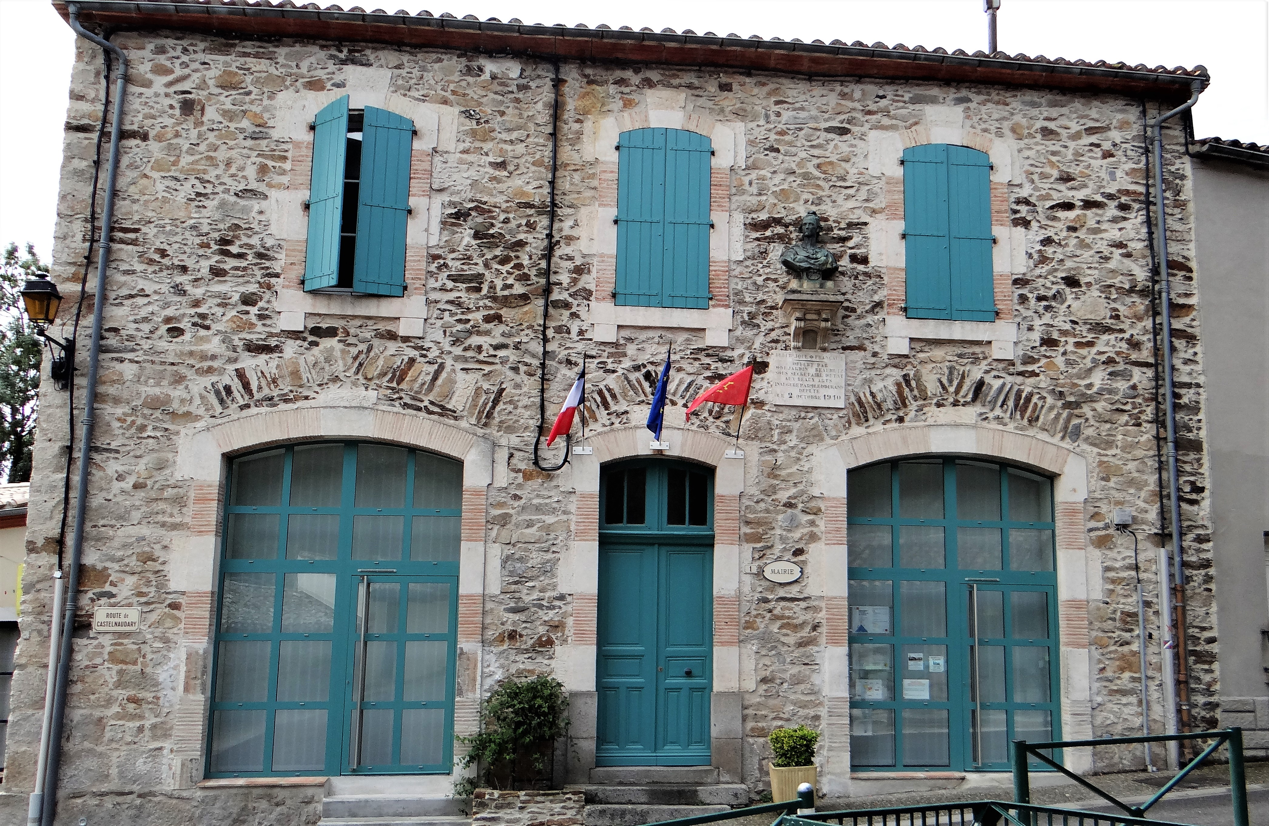 Verdun-en-Lauragais - Mairie